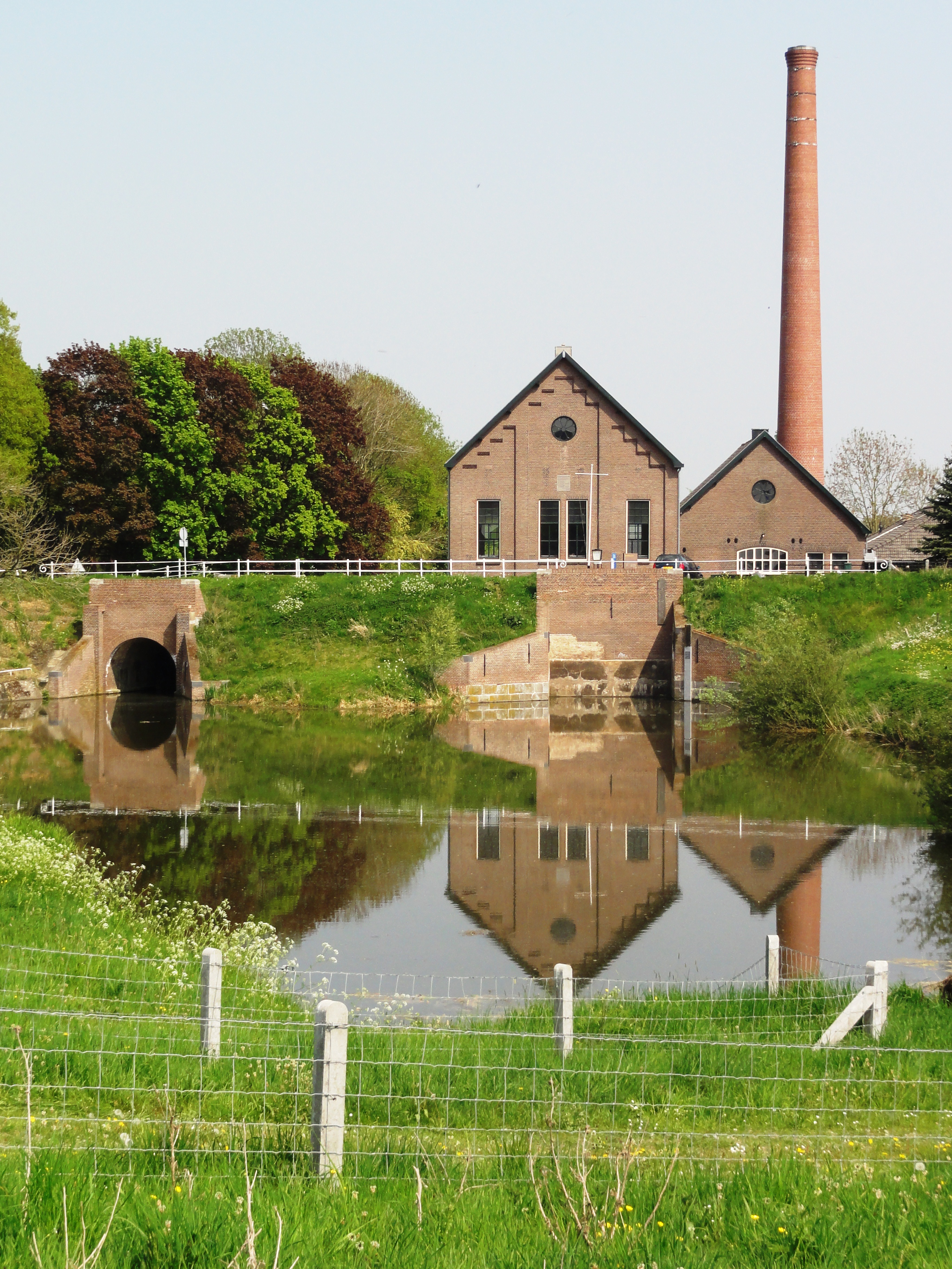 Appeltern, overzichtsfoto stoomgemaal de Tuut, machinehuis 13″ N, 5° 35′ 20.47″ E